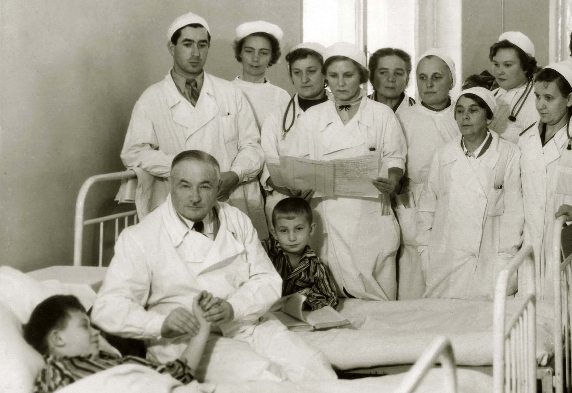 Обход профессора Аркадия Борисовича Воловика в клинике ЛПМИ